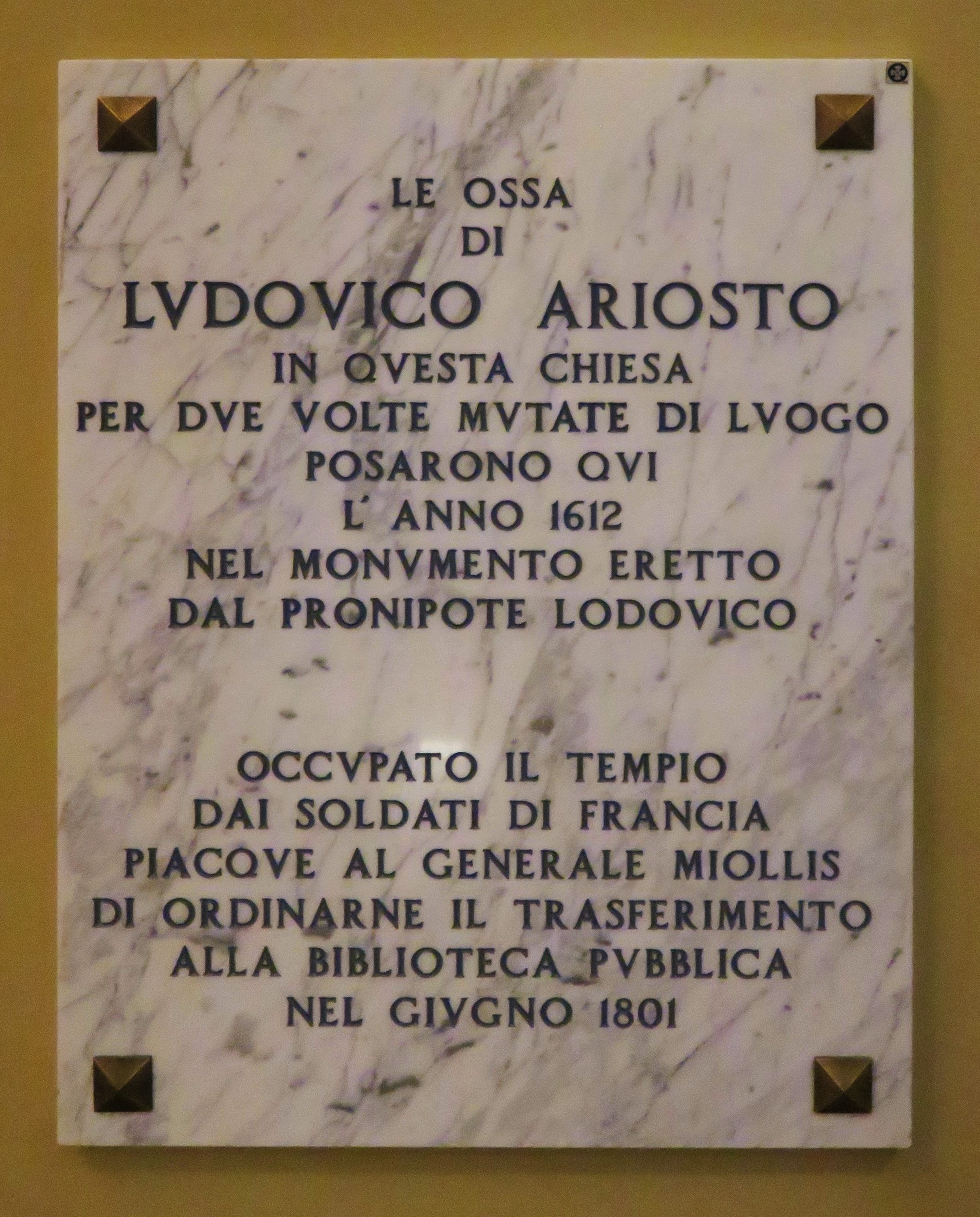 Chiesa di San Benedetto a Ferrara. Epigrafe nell'interno.